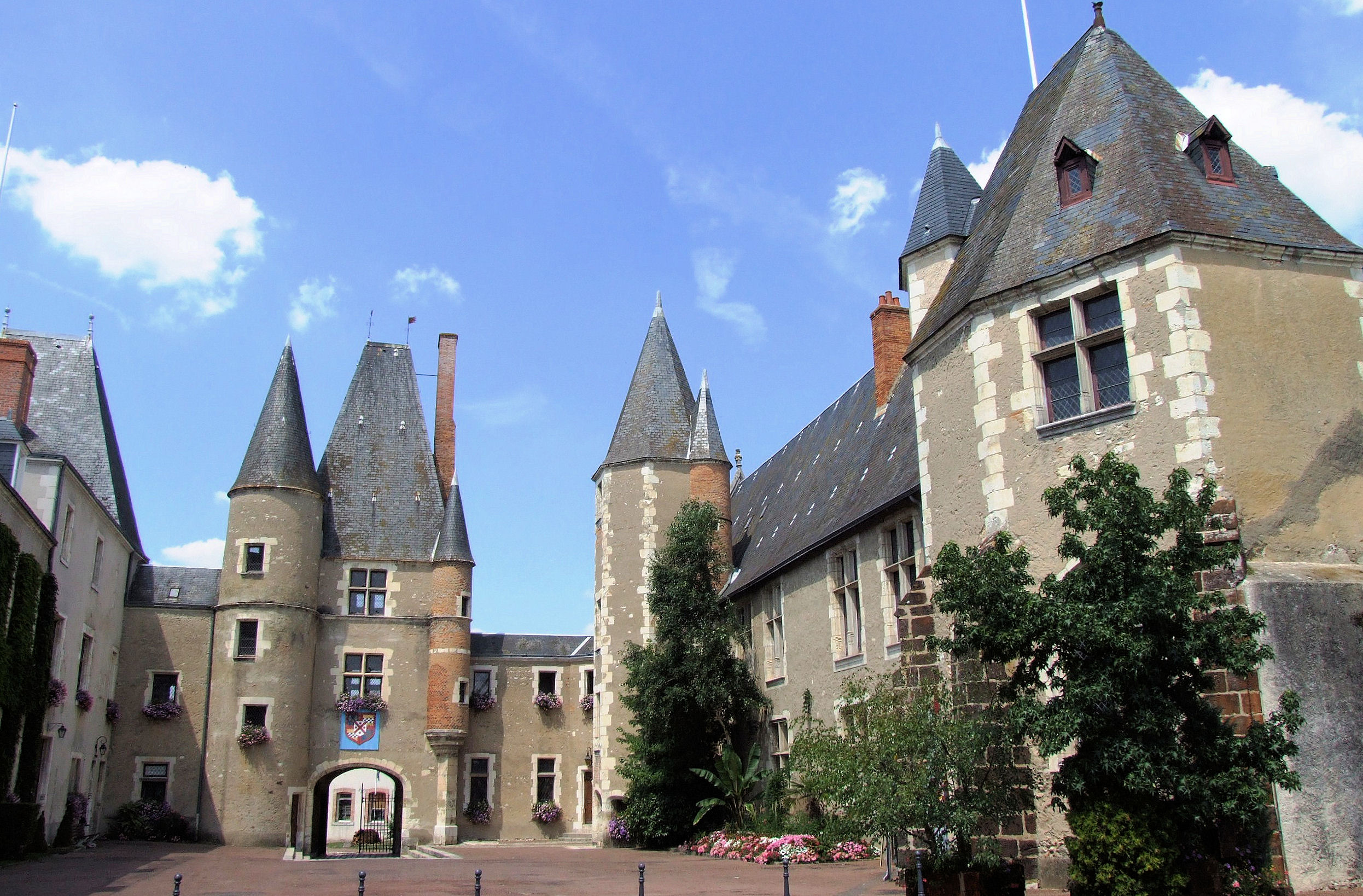 Aubigny-sur-Nère - Château des Stuarts - Côté cour